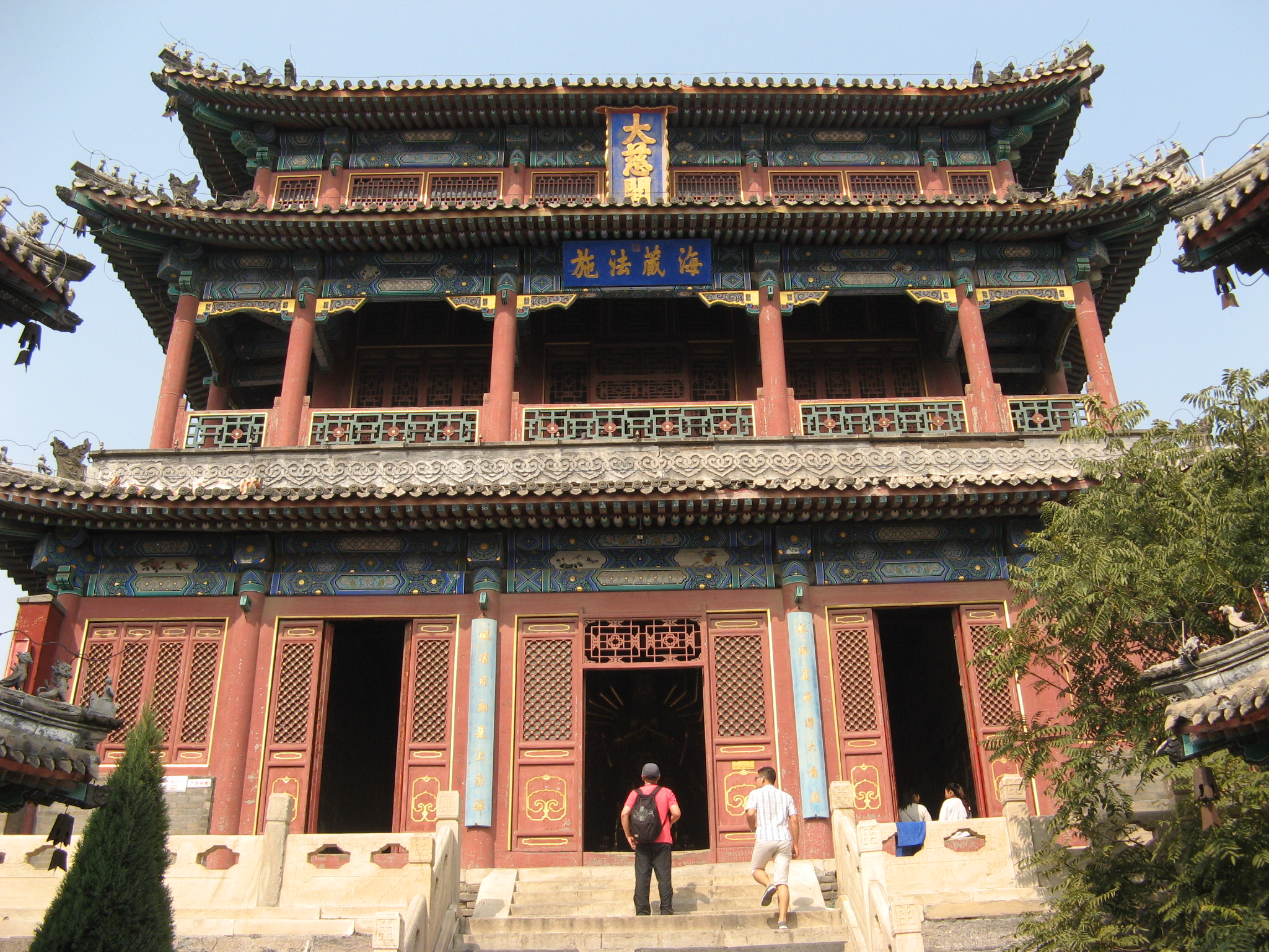 中国河北省保定市大慈阁，全国重点文物保护单位。